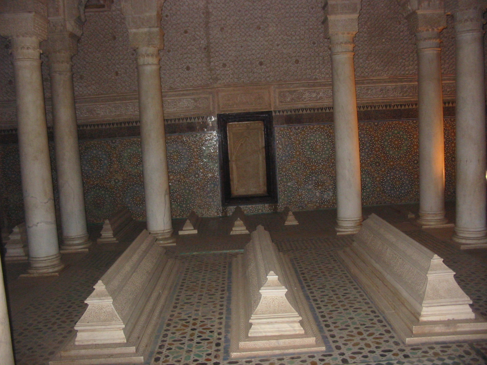 Marrakech, Saadian Tombs